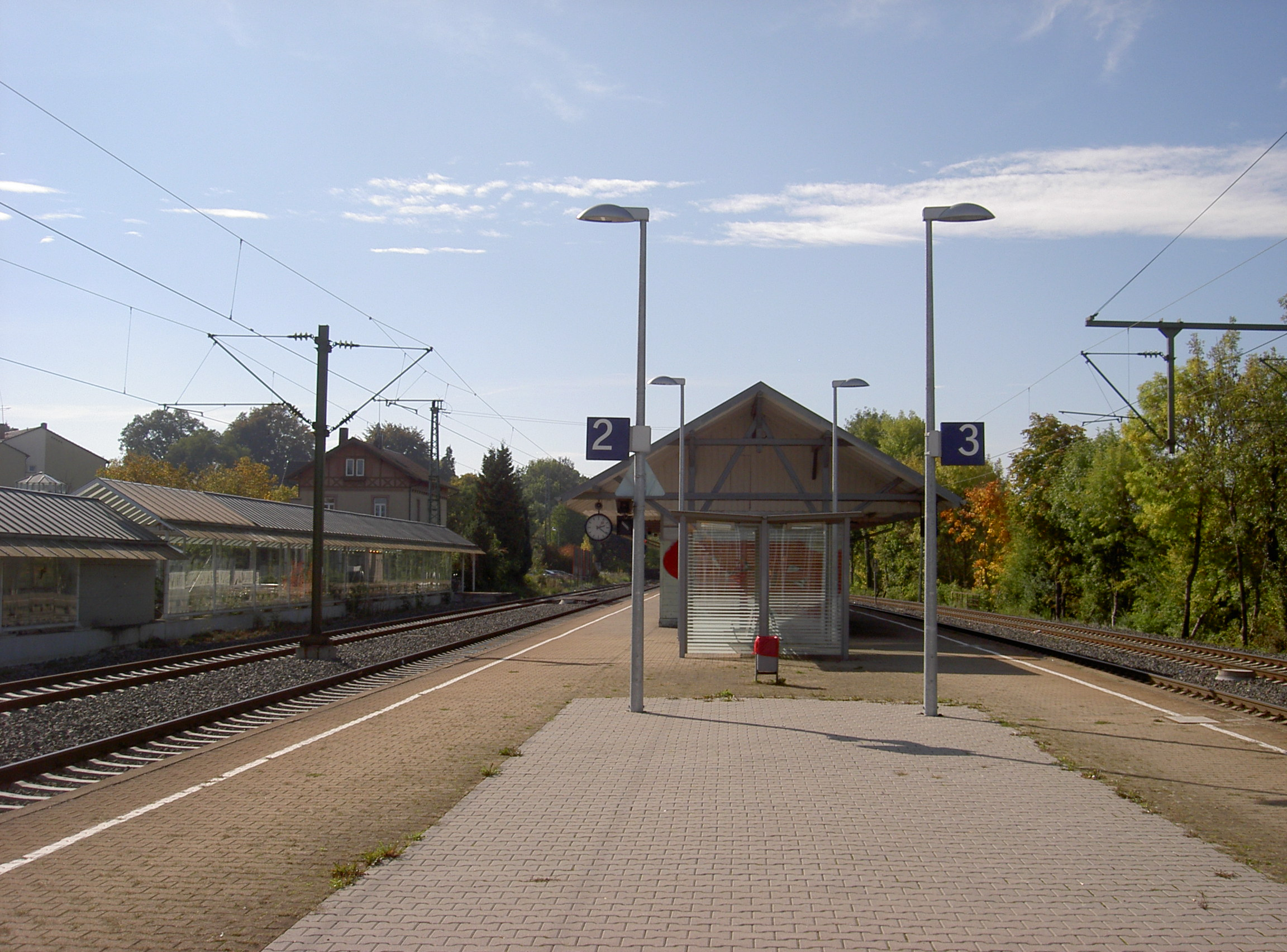 Bahnhof Sachsenheim